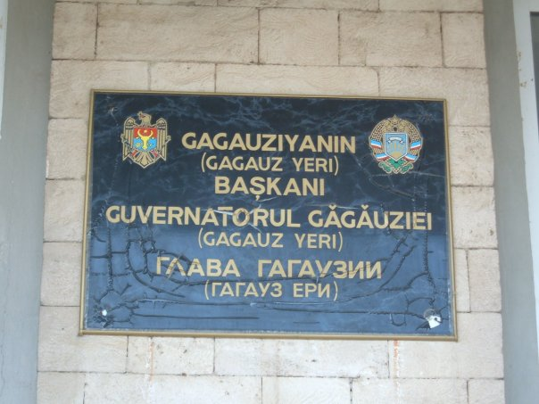 baskan